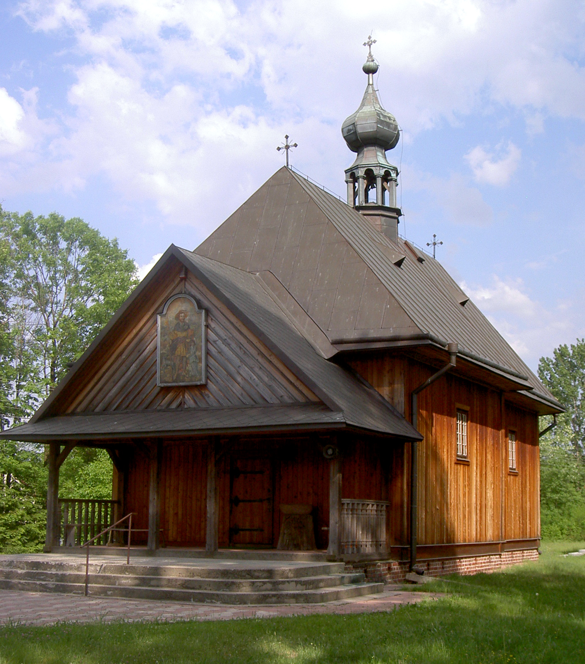 Tarnogród, Poland - Saint Roch's Church • Tarnogród, Polska - Kościółek św. Rocha